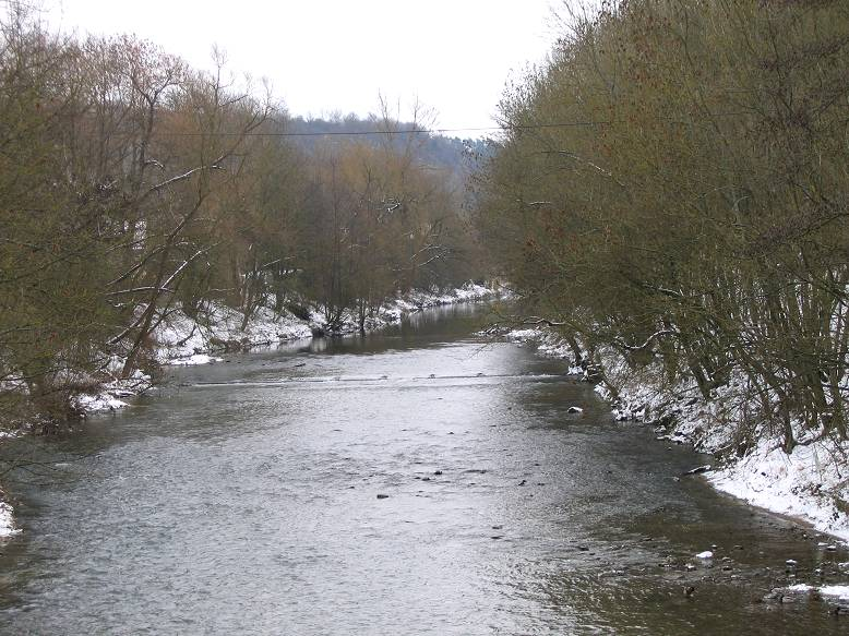 Die Murr bei Steinheim an der Murr Fotografiert von Mussklprozz am de:30. Januar de:2005